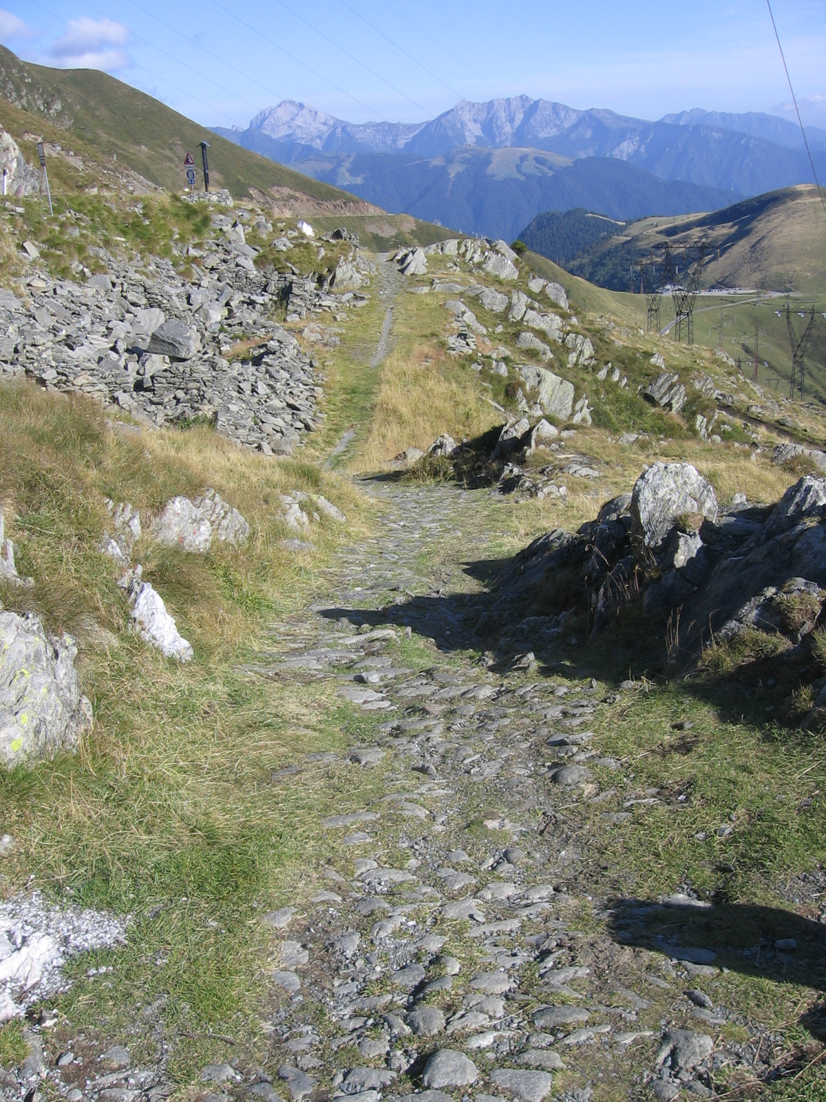 Mezzoldo, Bergamo, Italy